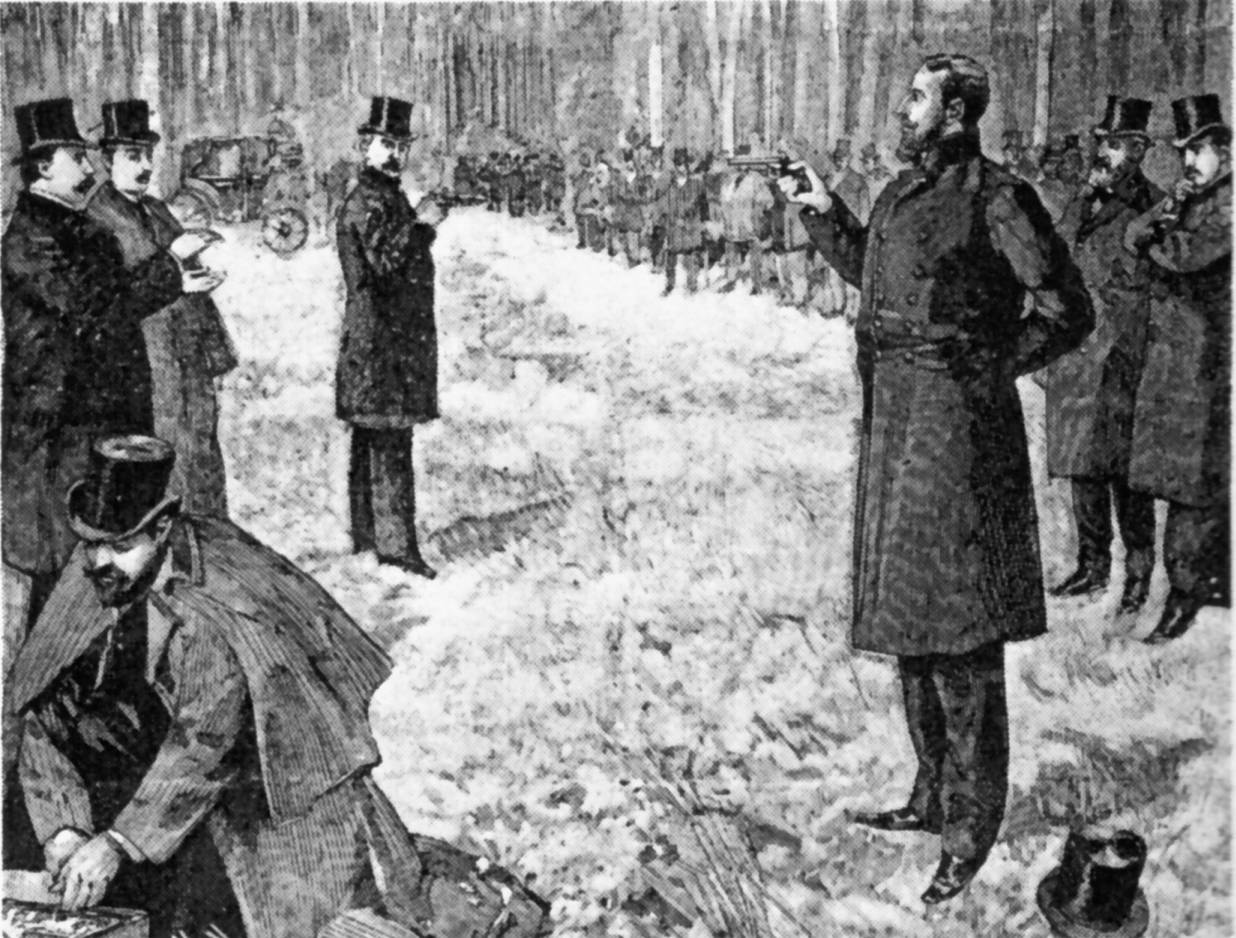 Duell zwischen Paul Déroulède und Georges Clemenceau am 21. Dezember 1892. Darstellung in der Berliner Illustrierten